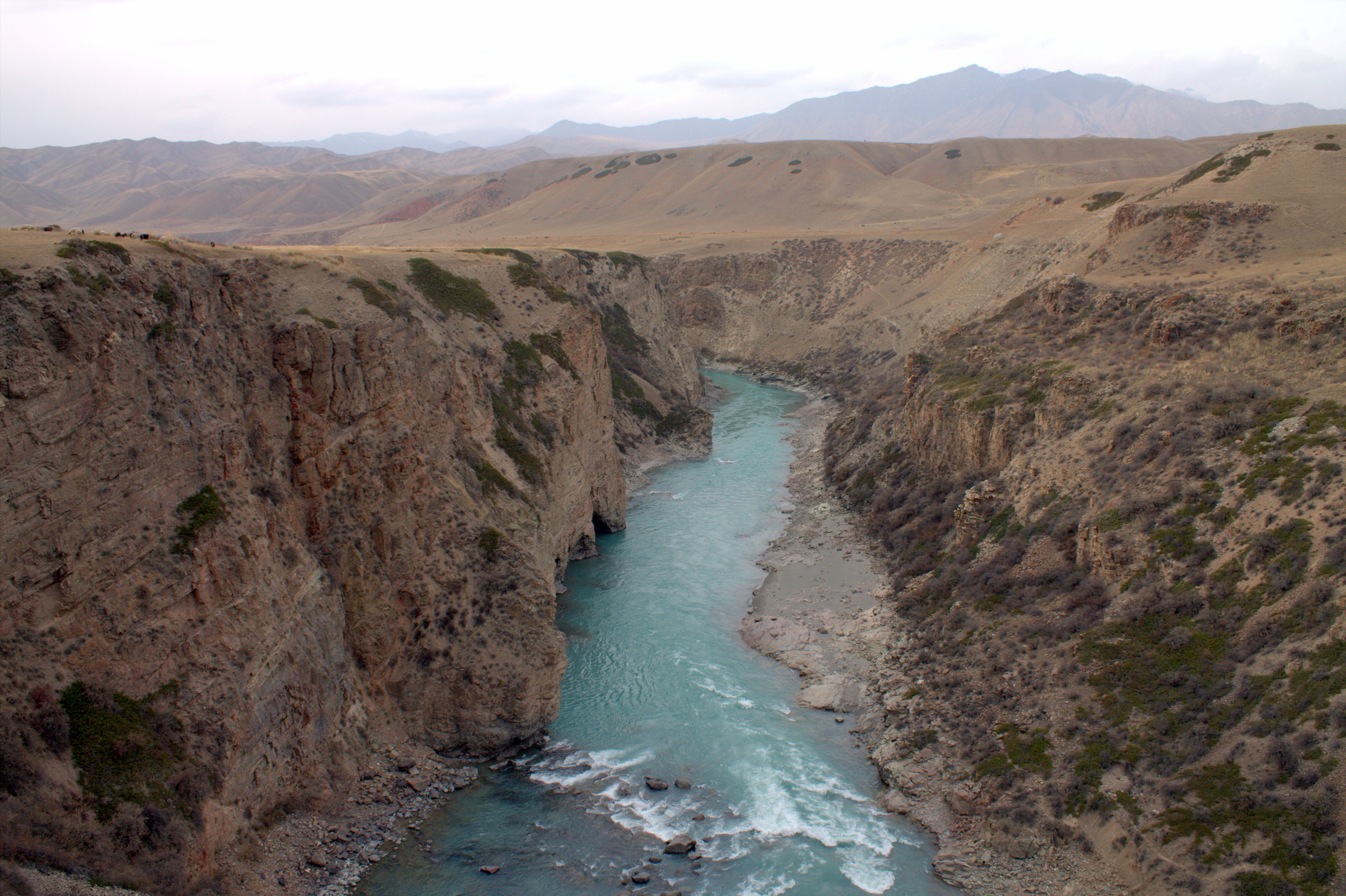 Створ плотины Акбулунской ГЭС